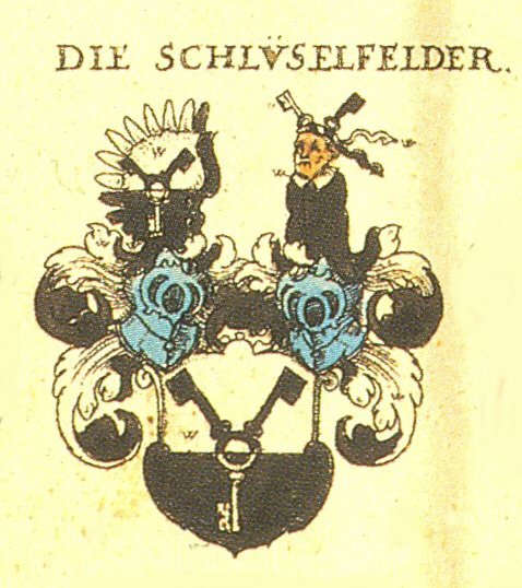 Wappen der Nürnberger Patrizierfamilie Schlüsselfelder von Kirchensittenbach